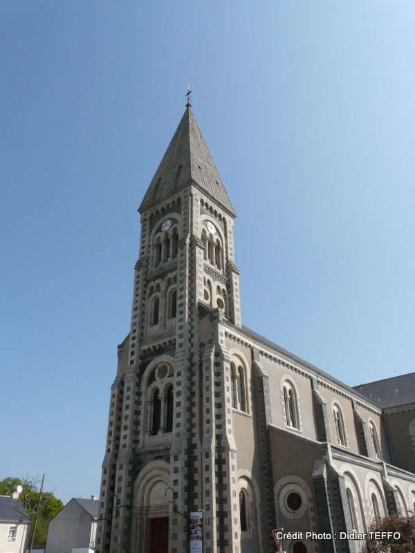 Clocher de l'église St Pierre aux liens (Nozay)